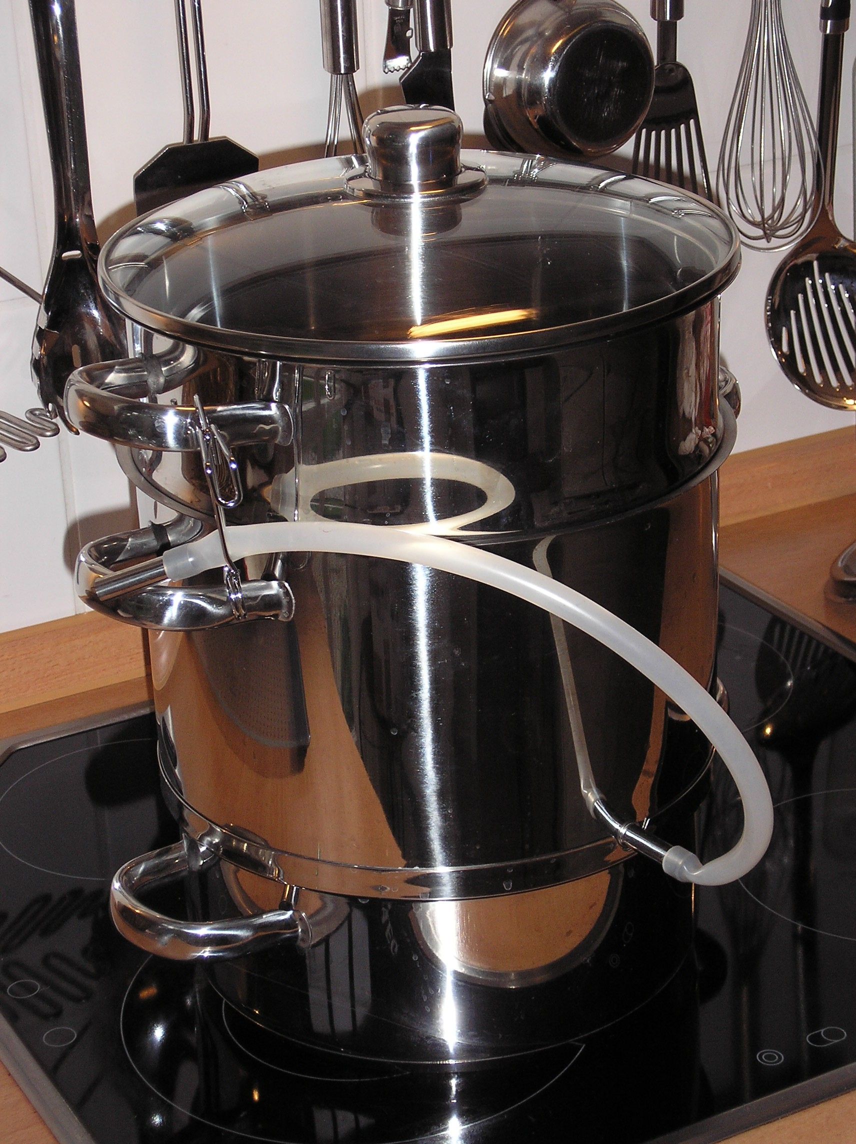 Ein moderner Dampfentsafter auf dem Herd, mit Wassertopf, Saftbehälter und Siebeinsatz